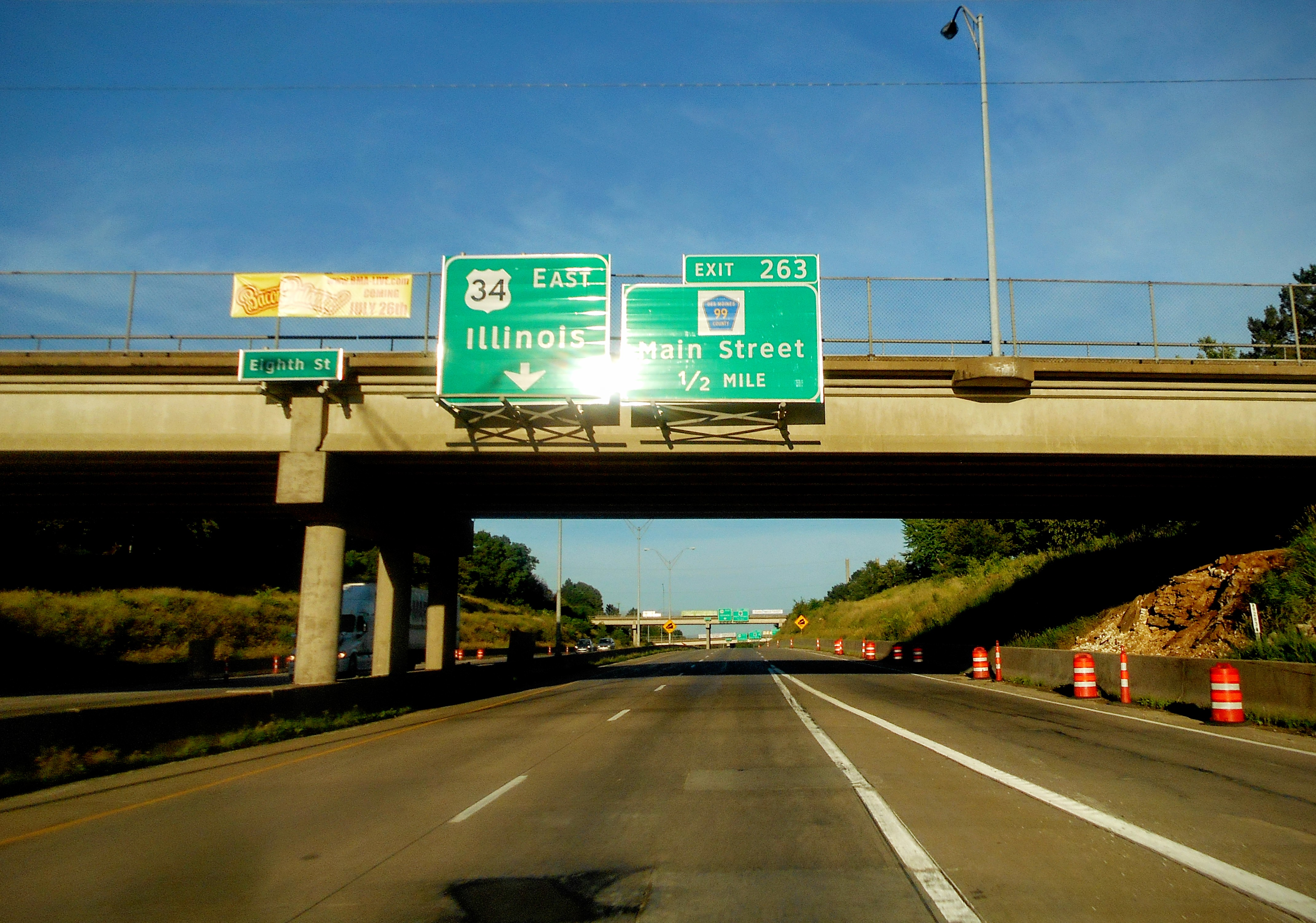 US 34 in Burlington, Iowa